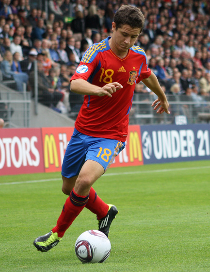 Ander Herrera Spain U-21